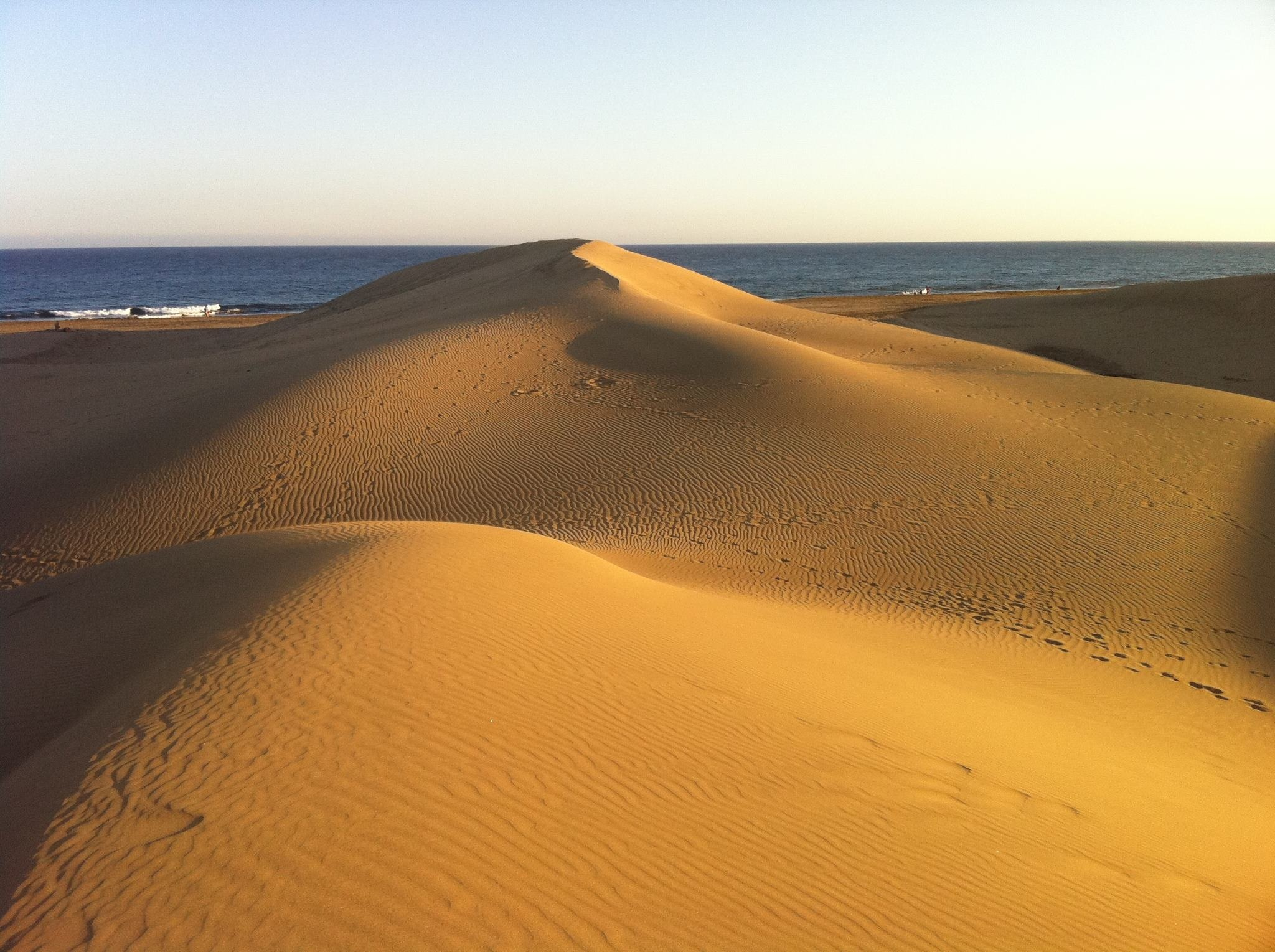 Dunas de Maspalomas